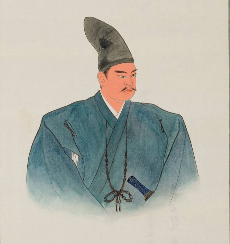 上杉景勝（1556 - 1623）の肖像画